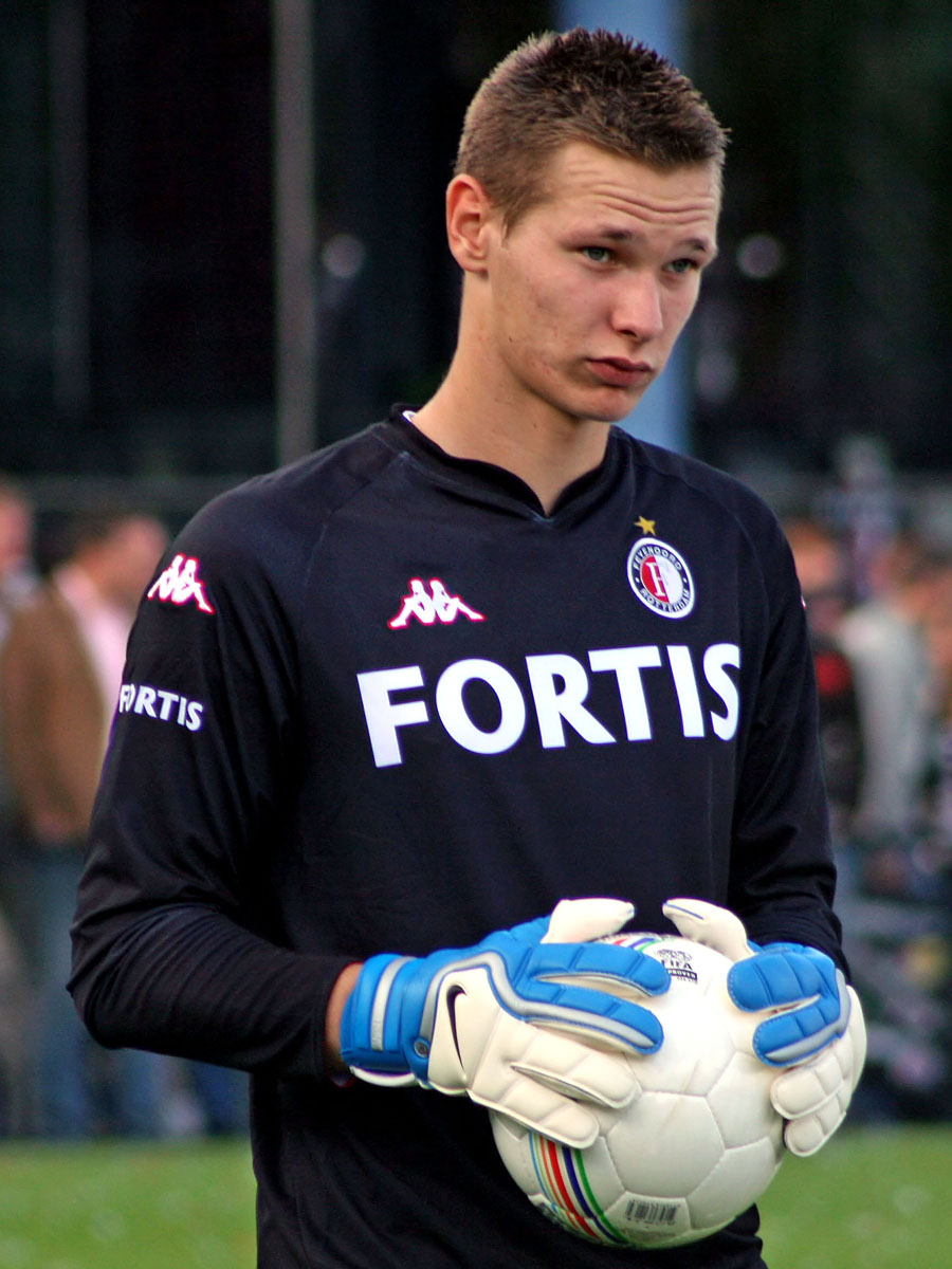 Raoul Beeking (DCS)